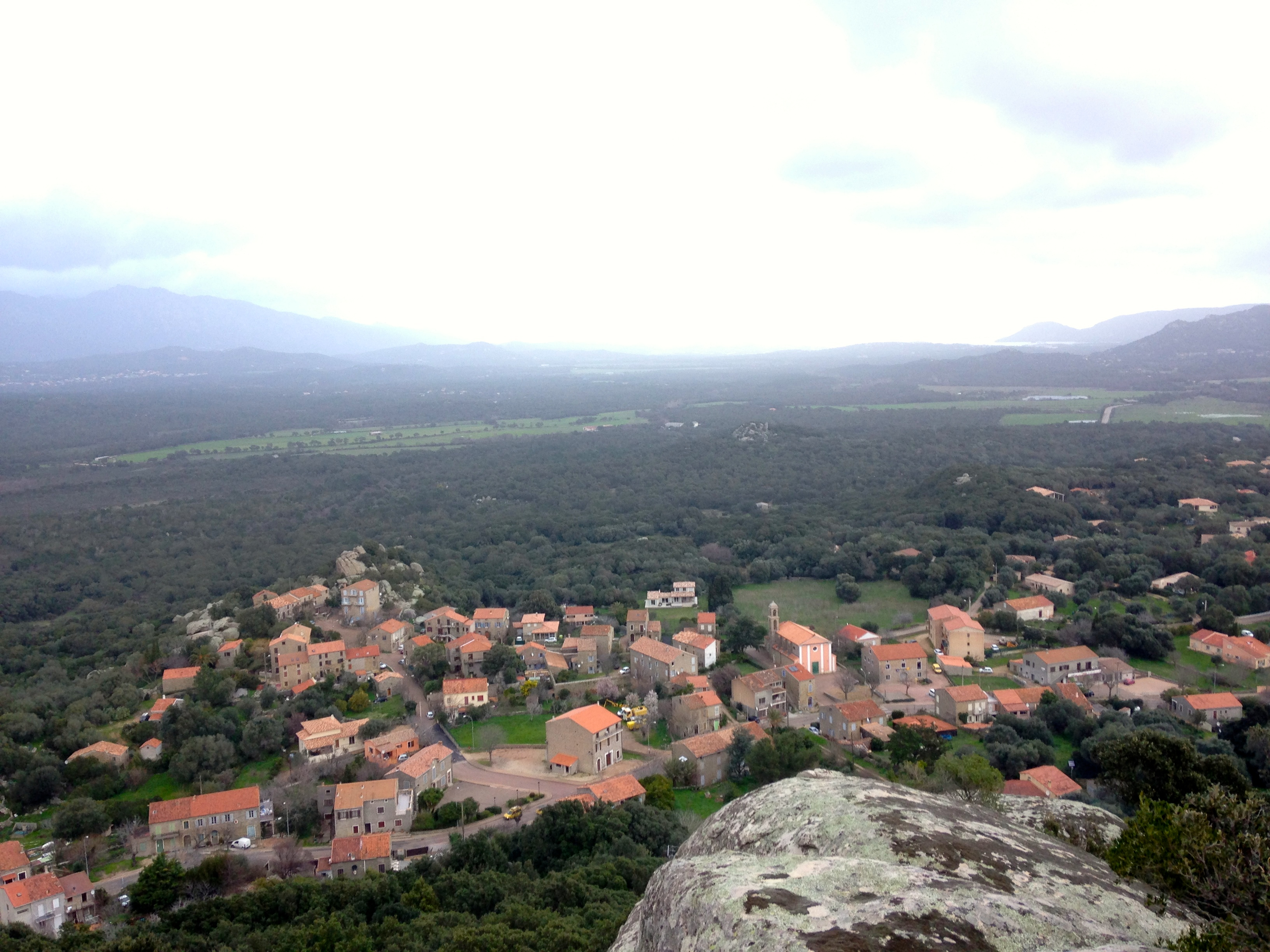 Vue panoramique de Sotta depuis la Punta